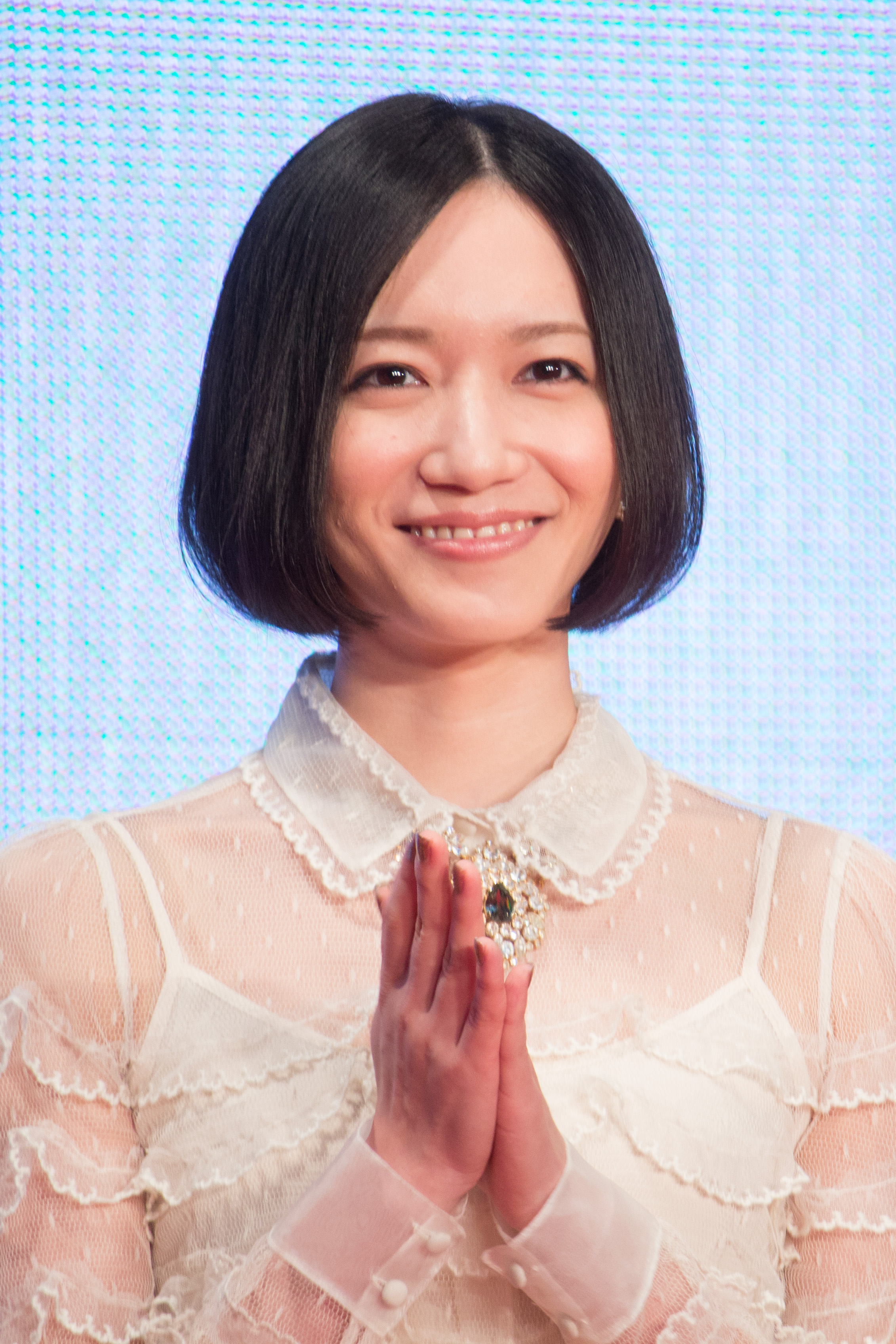 第28回 東京国際映画祭 オープニングセレモニー のっち (Perfume) (We Are Perfume)